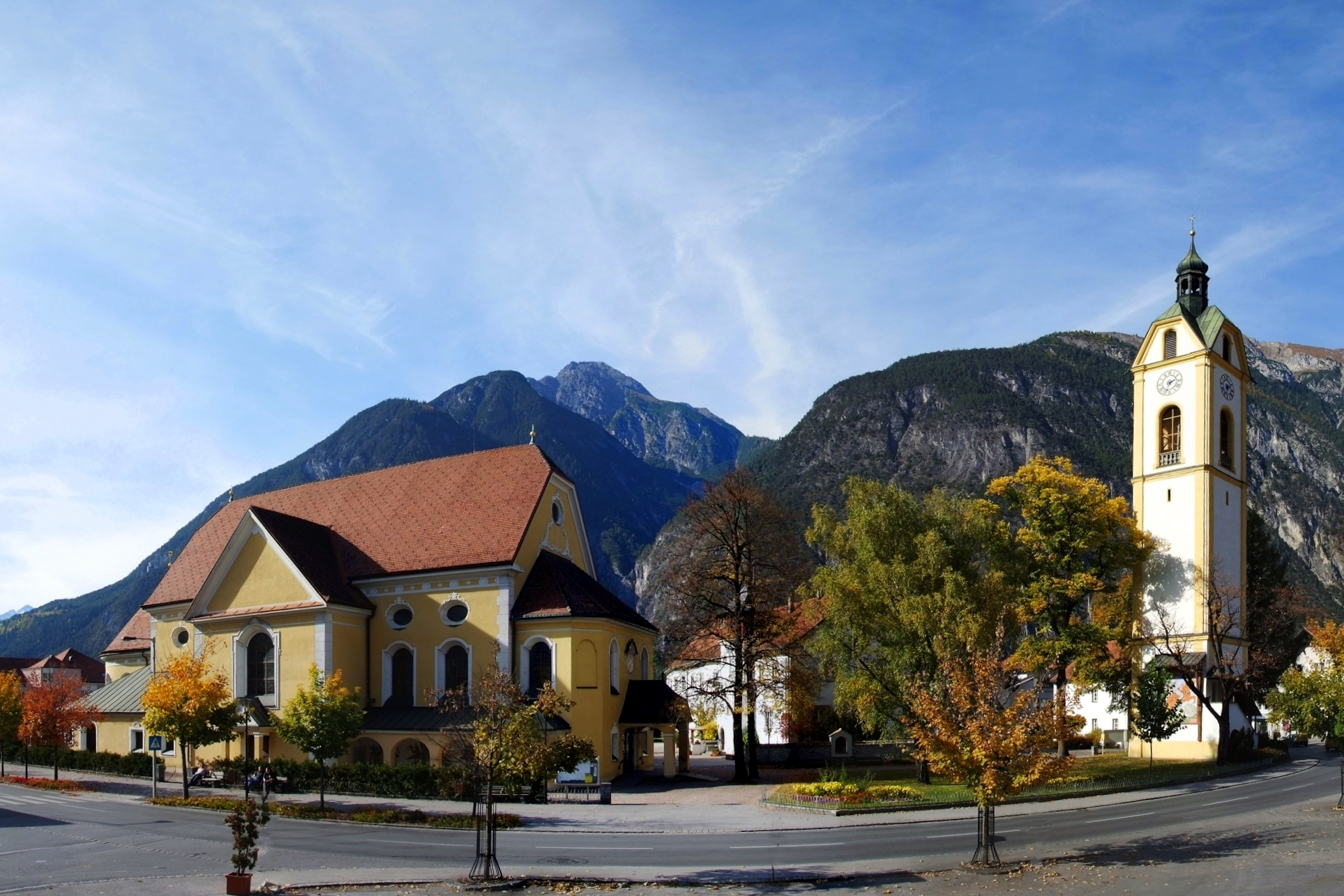 [Pfarrkirche Zams mit freistehendem Kirchturm]